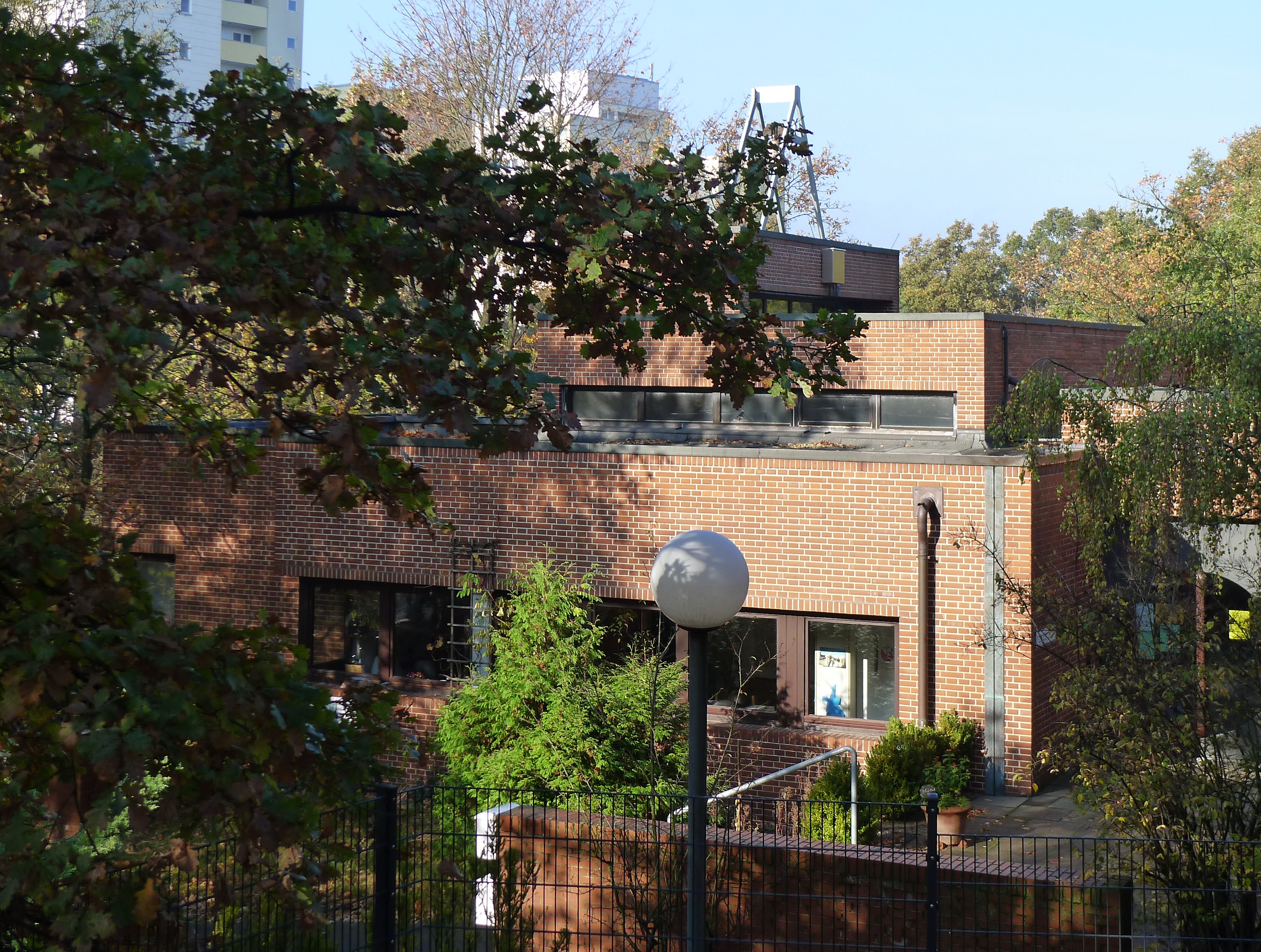 Gesamteindruck vom Gemeindezentrum